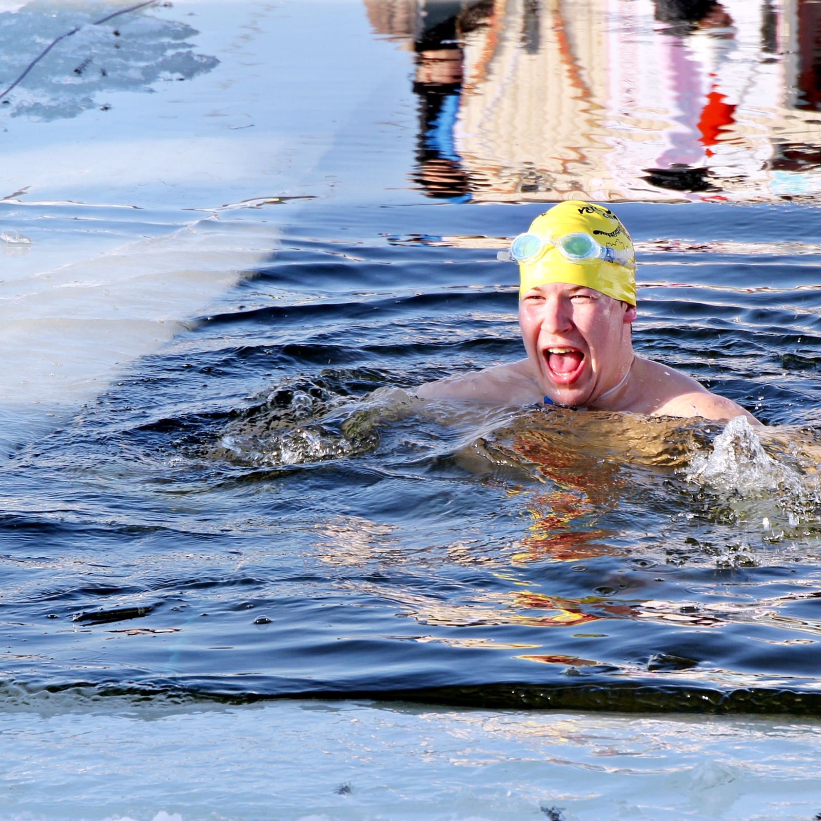 Talvine ujumine. Korraldaja - triatloni klub Trismile.